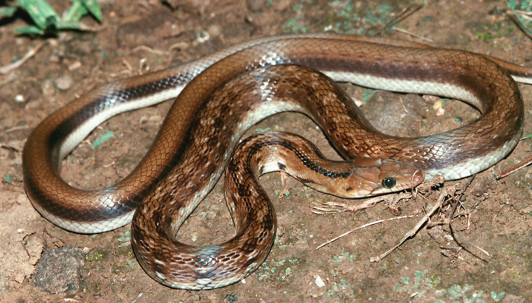 Coelognathus helena Nouvelle version de Trinket.jpg : balance des blancs ; recadrage.